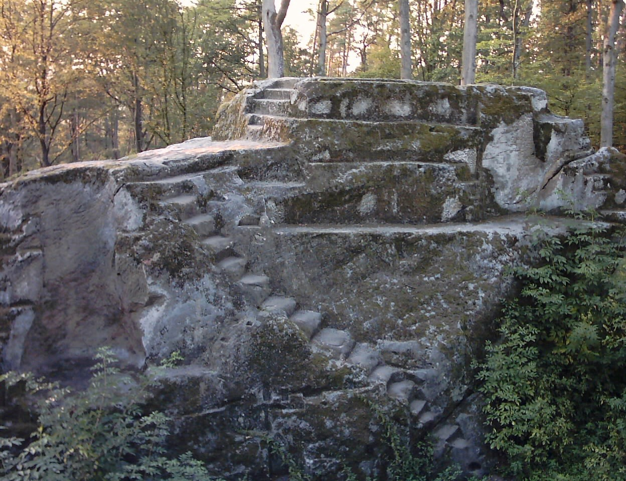 Der Nordwestfelsen